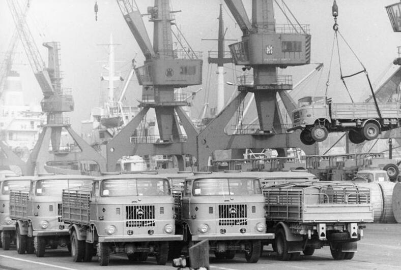 ADN-ZB/Sindermann/15.3.82/Bez. Rostock Wettbewerb: Der Rostocker Überseehafen ist auch Großumschlagplatz für Lastkraftwagen "W 50" aus Ludwigsfelde. Von dort treten sie ihre Reise in viele Länder an. Die Umschlagleistungen der Kollektive sollen in diesem Jahr 16,4 Millionen Tonnen betragen. Verbesserte Technologien und Rationalisierungsmaßnahmen sind dabei ausschlaggebende Faktoren für den Leistungsanstieg.